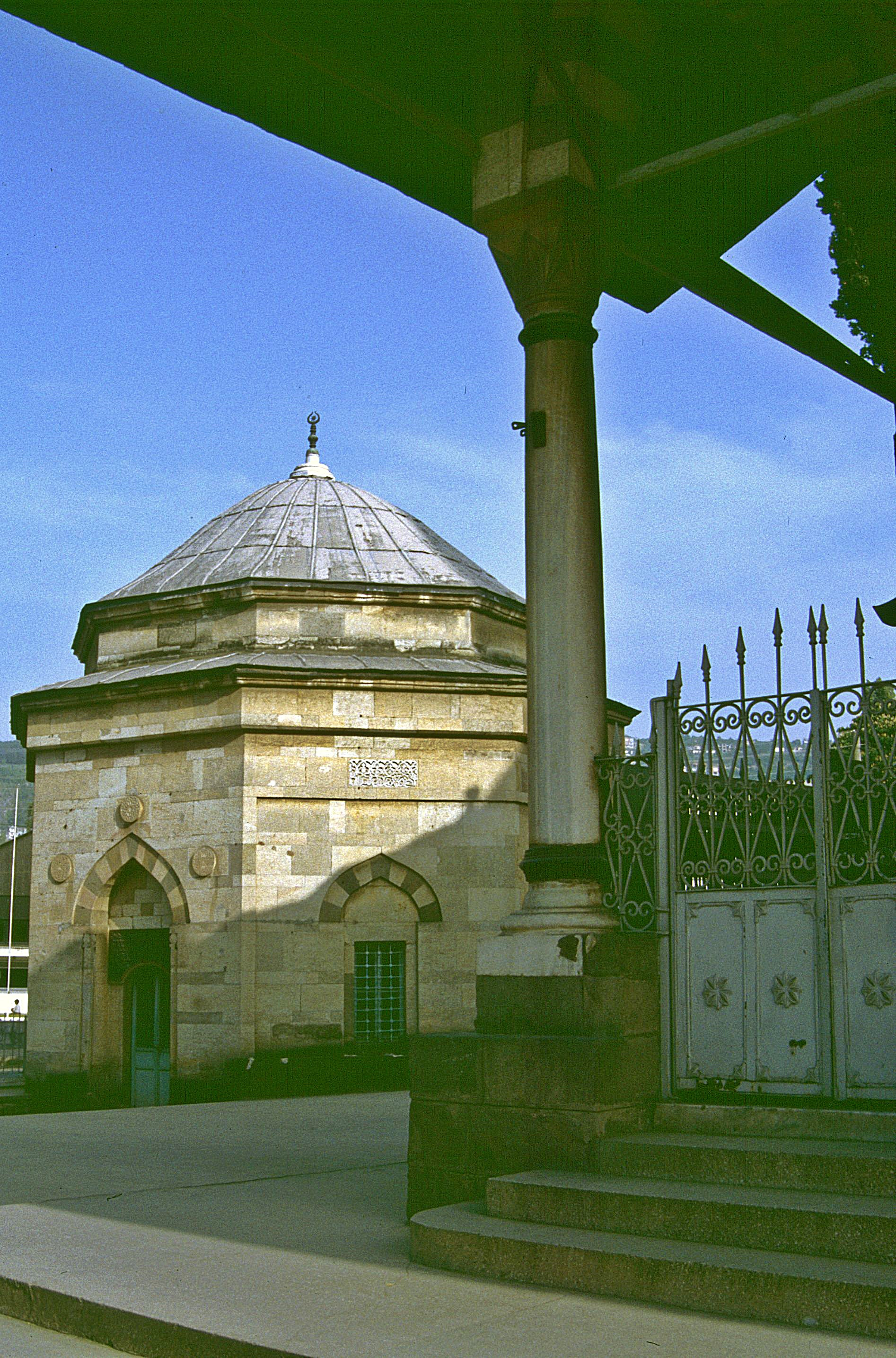 Trabzon, Türbe der Gülbahar Hatun Camii